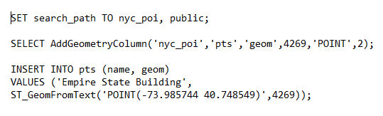 Монгол: гео өгөгдөл